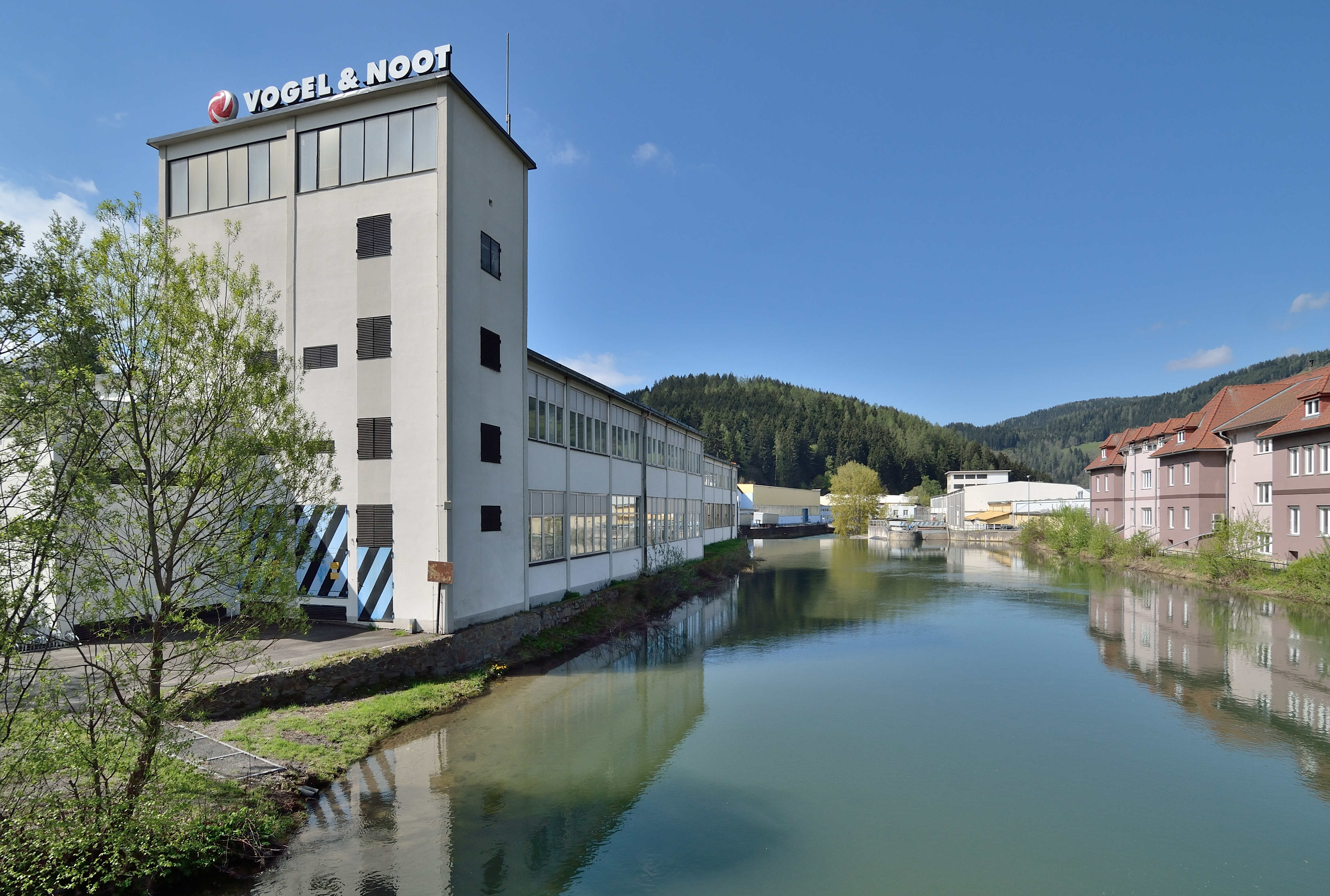 Industrieanlagen in Wartberg im Mürztal, vermutlich alle Vogel & Noot.